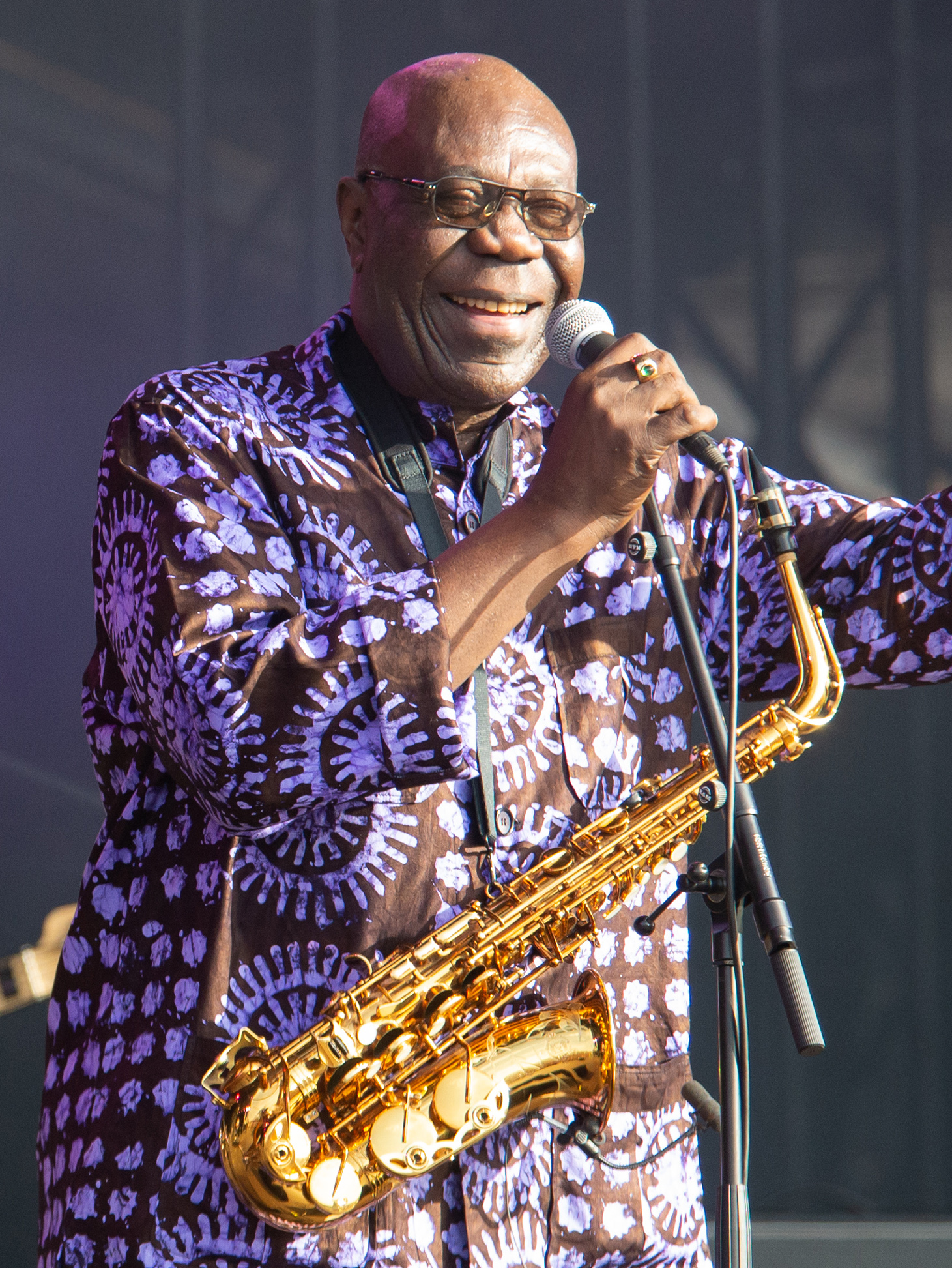 Concert de Manu Dibango au festival Les Escales, Saint-Nazaire, juillet 2019.